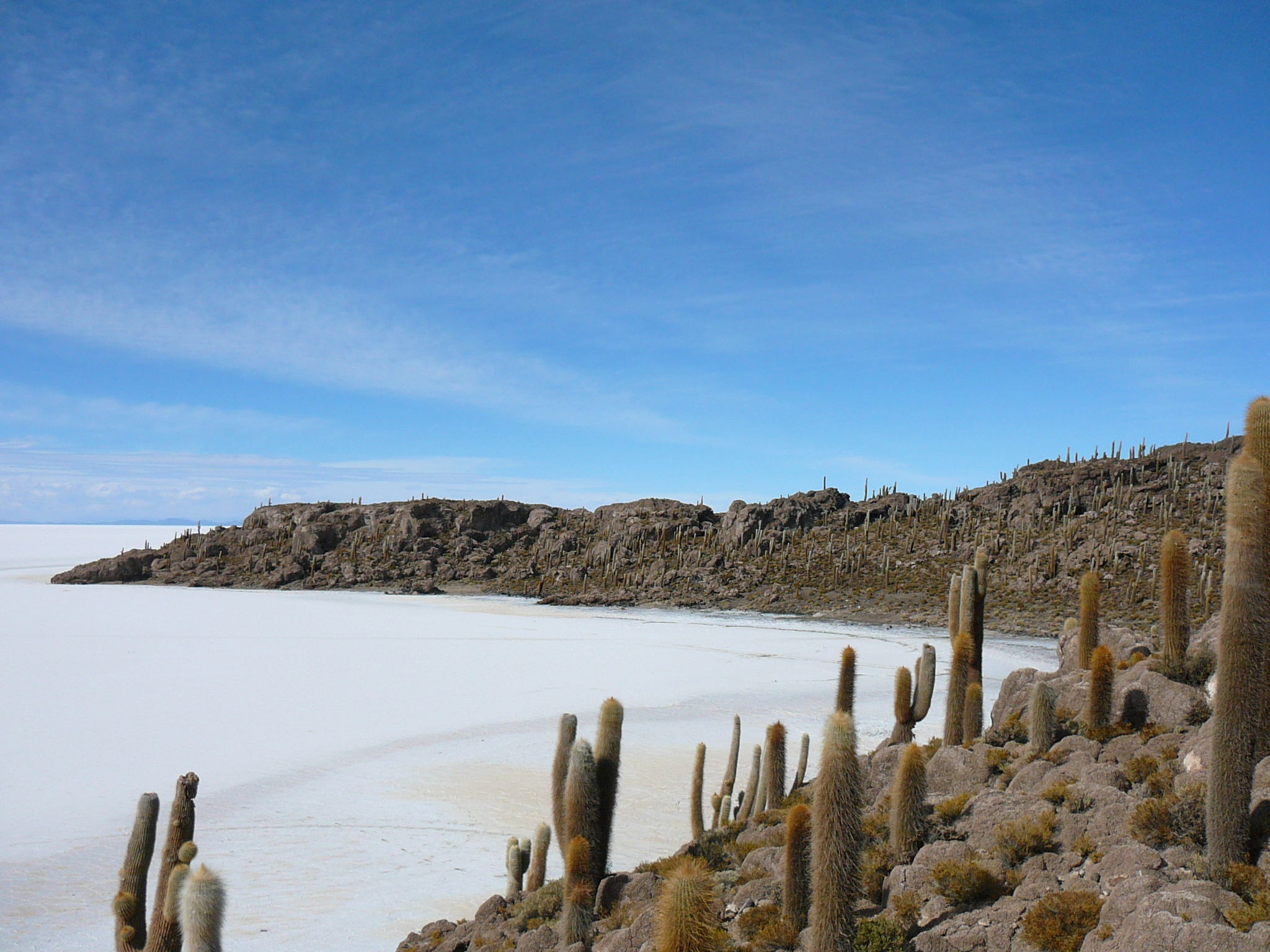 Isla Incahuasi, Salar de Uyuni - Bolivia